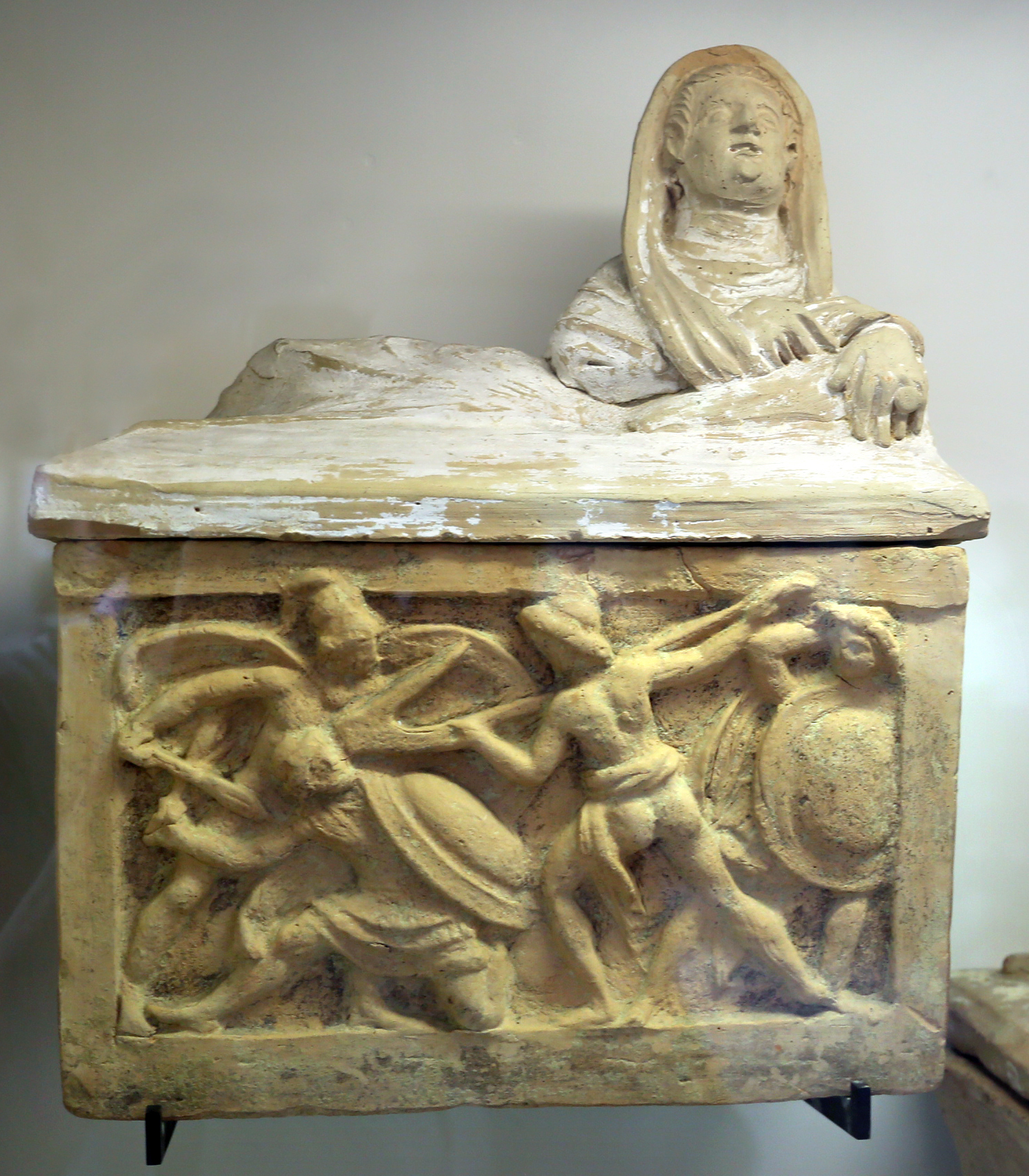 Collections of the Museo archeologico nazionale (Parma) This is a photo of a monument which is part of cultural heritage of Italy.